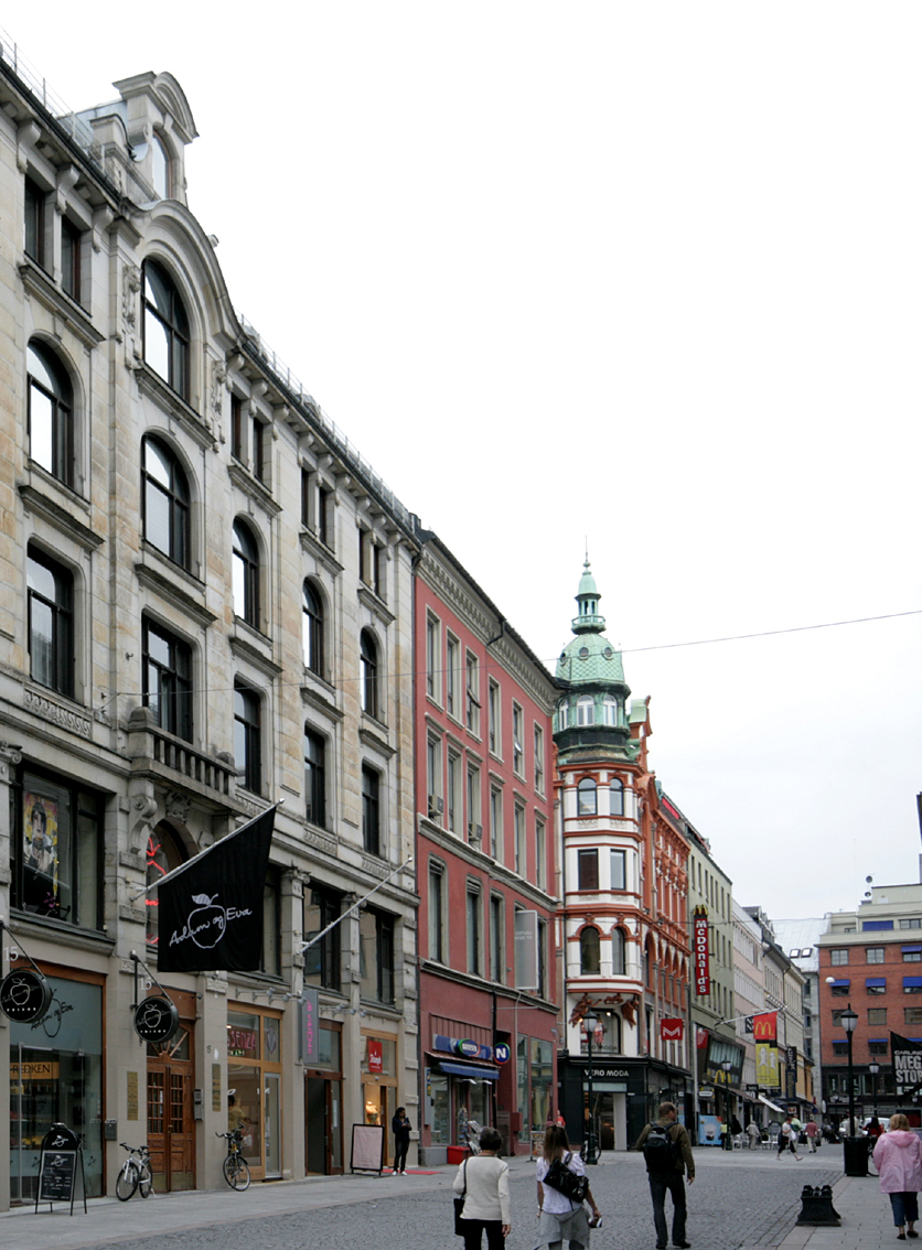 Nedre Slottsgate, Oslo, Norway.